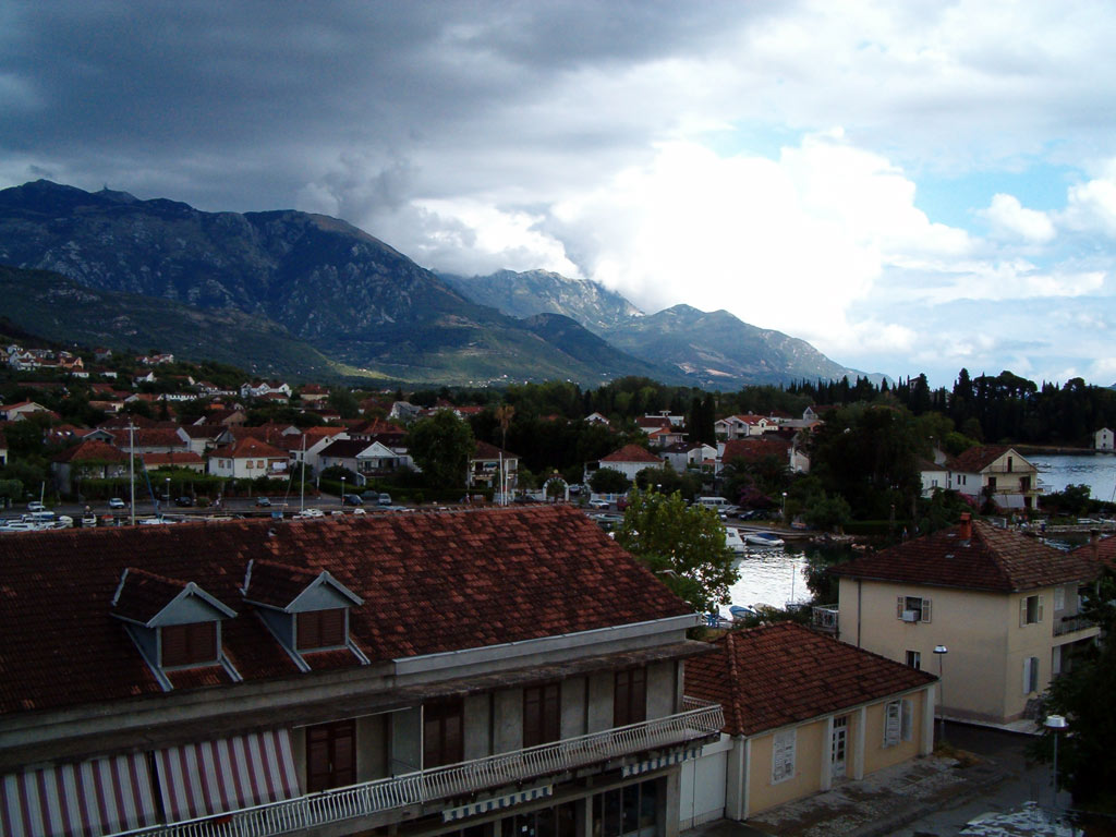 Tivat (Černá Hora); HP Photosmart 735; ISO 100; clona F/4,9; čas expozice 1/491s; délka focusu 6mm